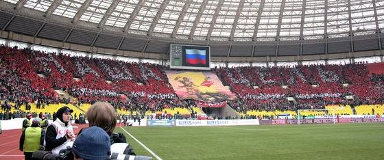 Перфоманс "Наша цель" на домашнем матче с "Зенитом". 2009 год